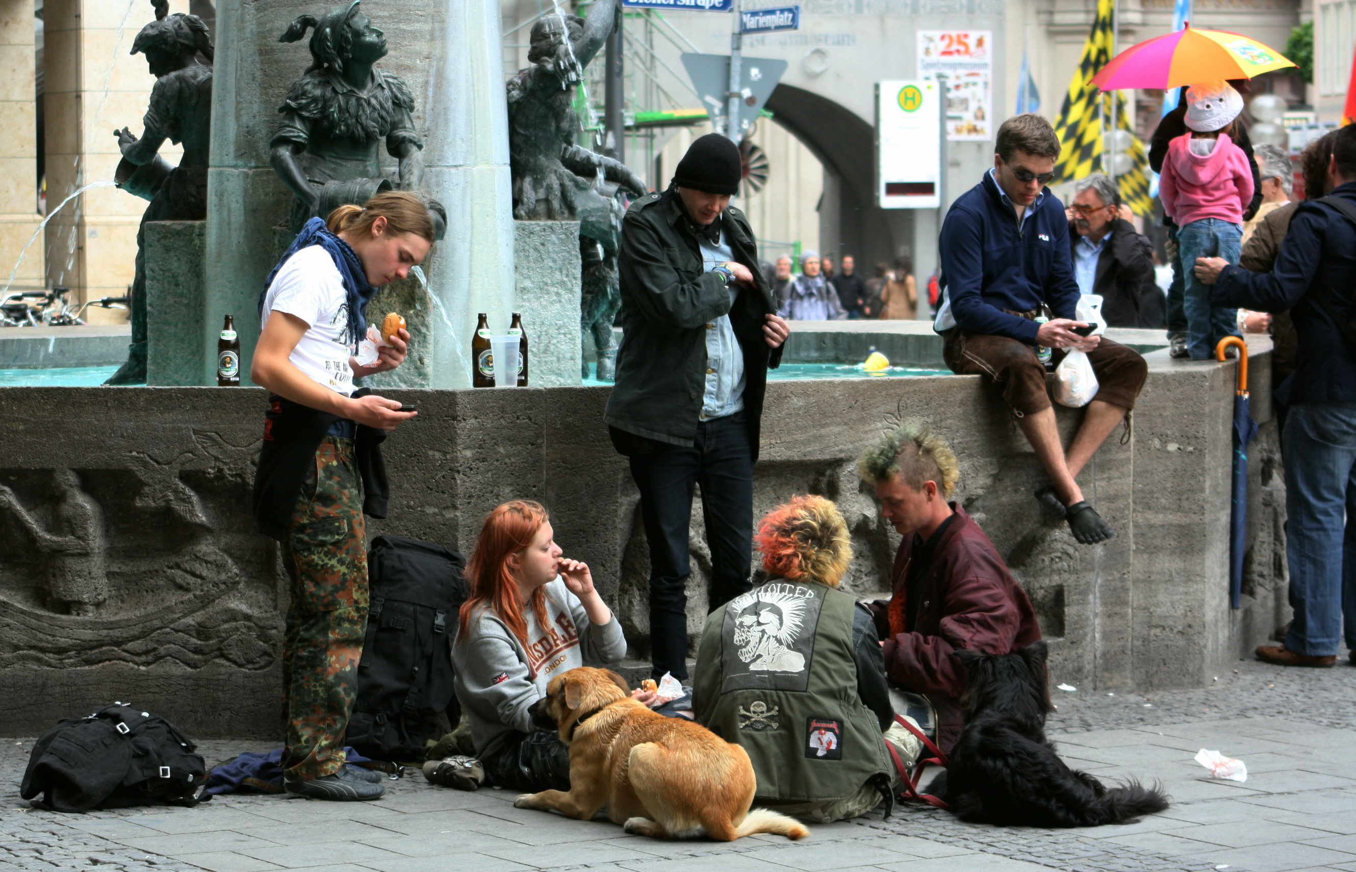 Punks am Fischerbrunnen am Marienplatz in München am Tag der Arbeit 2011.